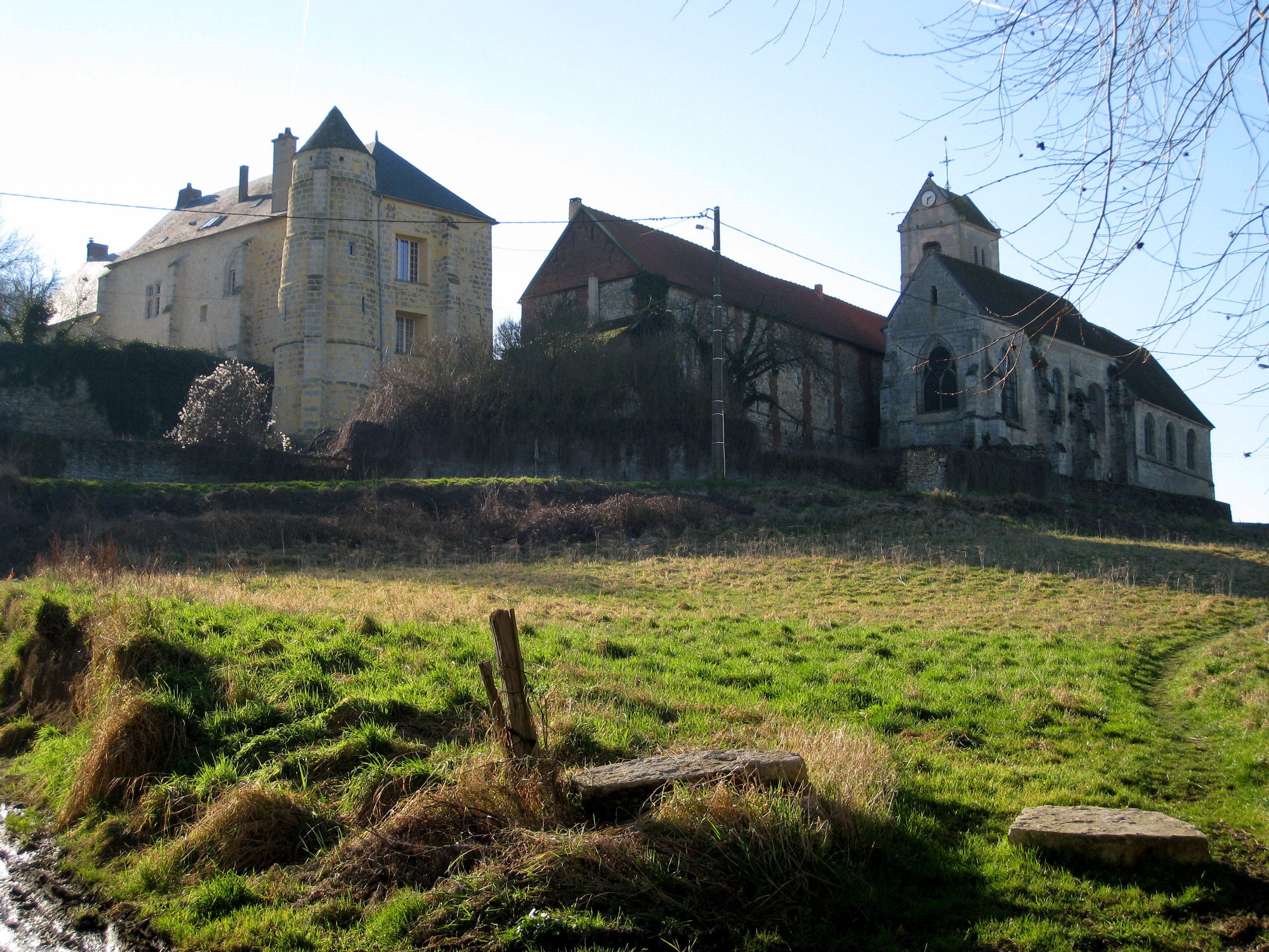 L'église de Tourly, Oise, France